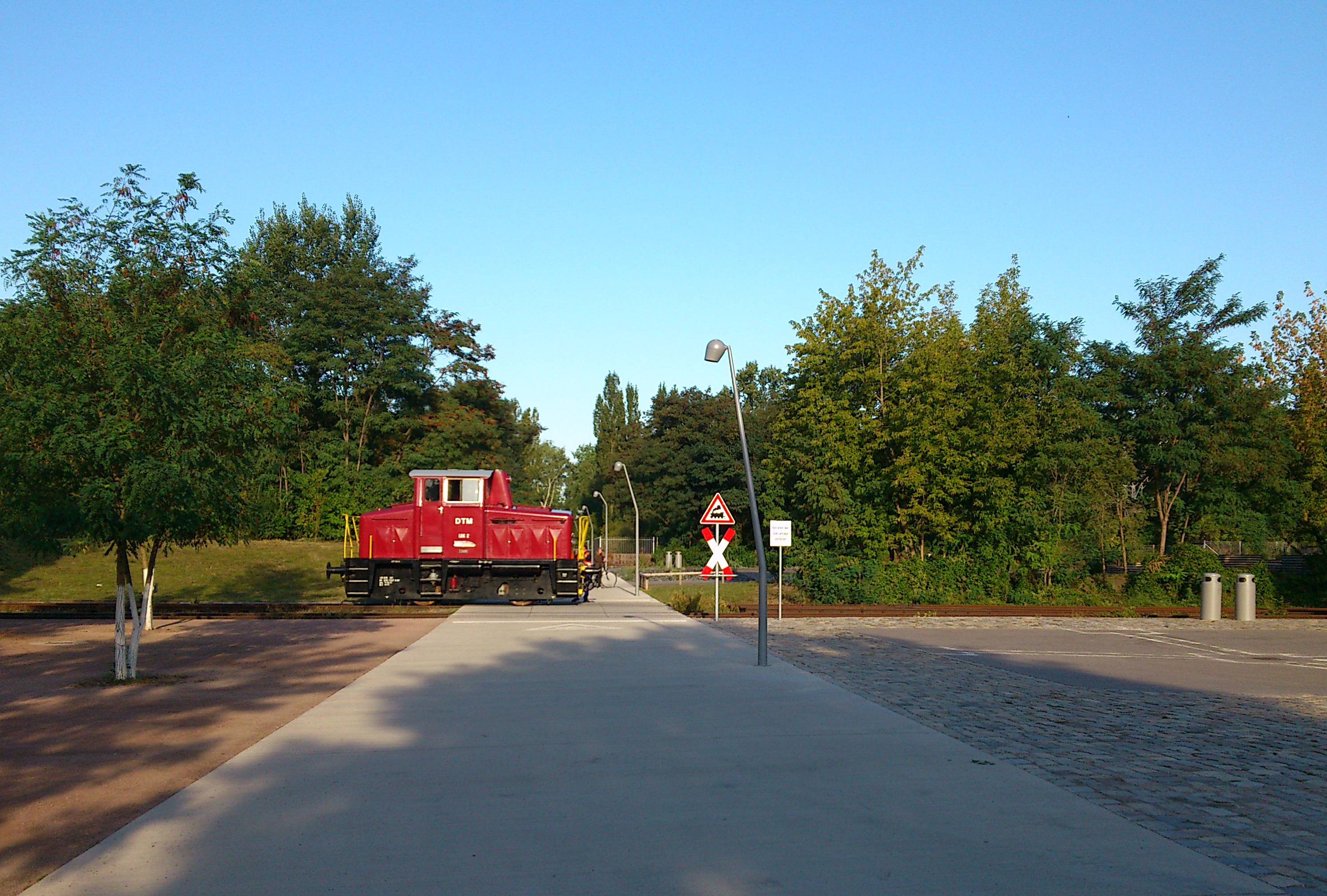 O&K-Lokomotive, Lok 2 des Deutschen Technikmuseums Berlin, passiert den Park Gleisdreick Berlin